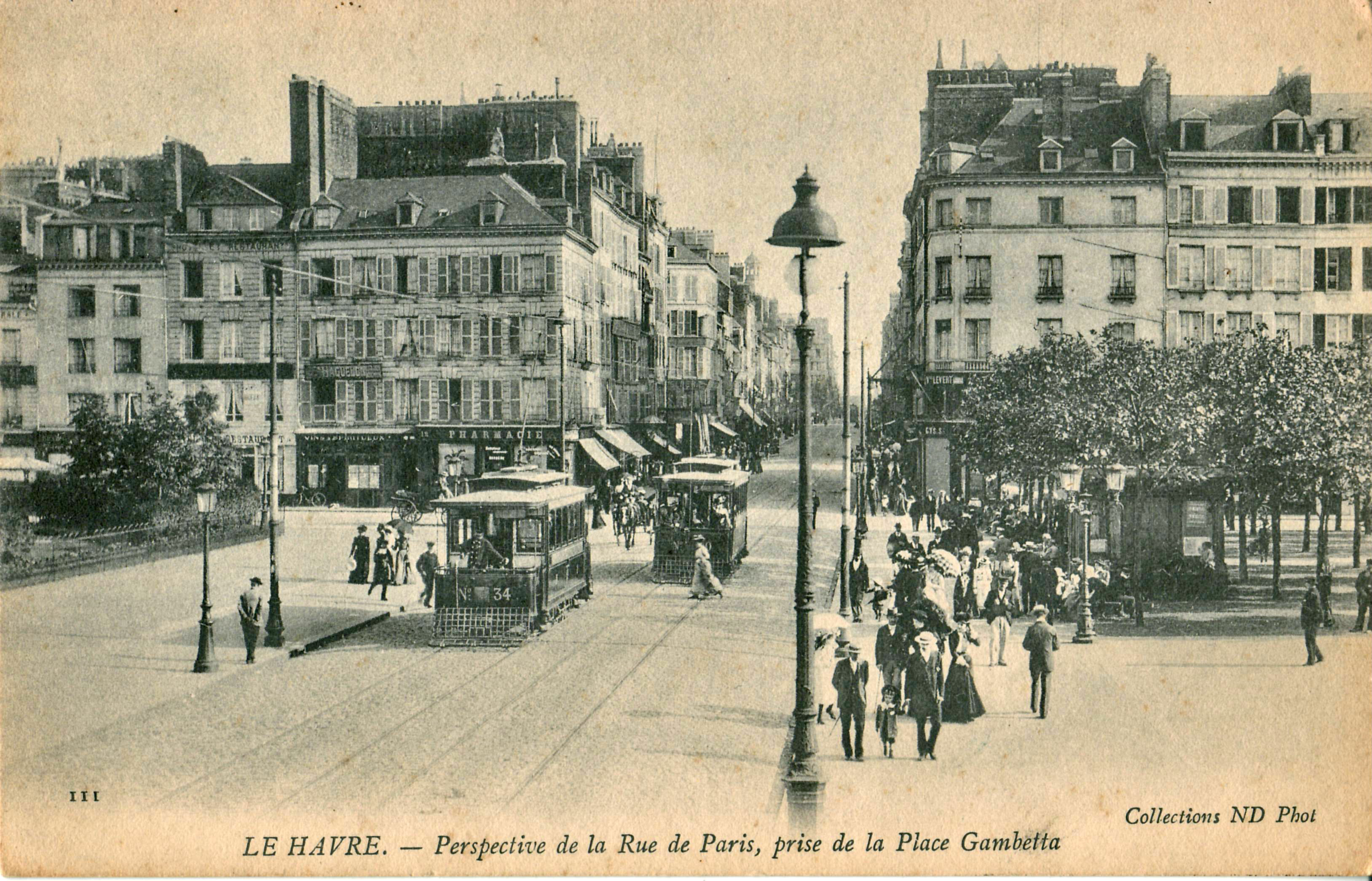 Carte postale ancienne éditée par ND, n°111 : LE HAVRE - Perspective de la rue de Paris, prise de la Place Gambetta